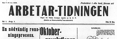 Logotyp för Arbetar-Tidningen (svensk dagstidning).